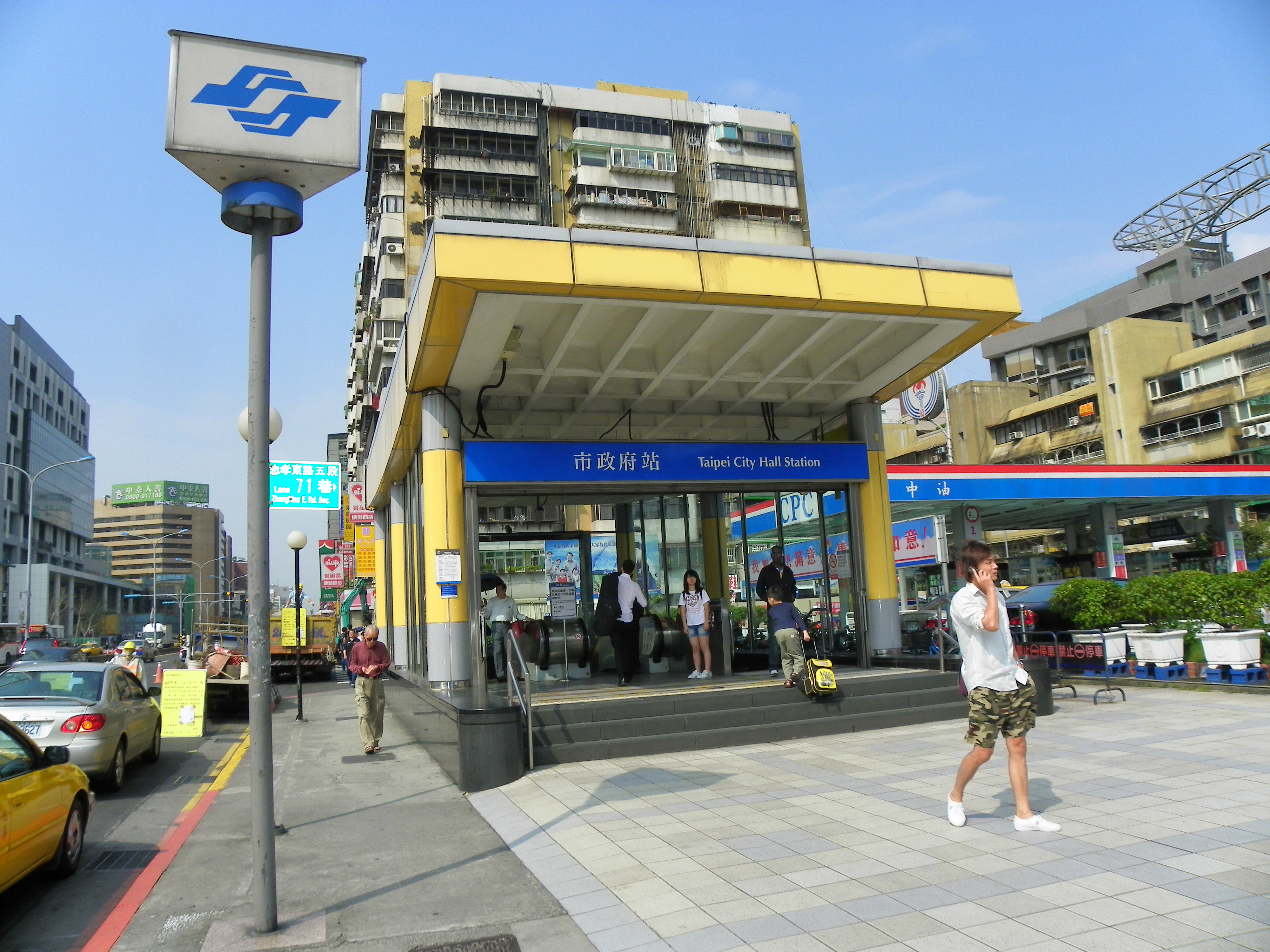 台北捷運南港線市政府駅4号出口。